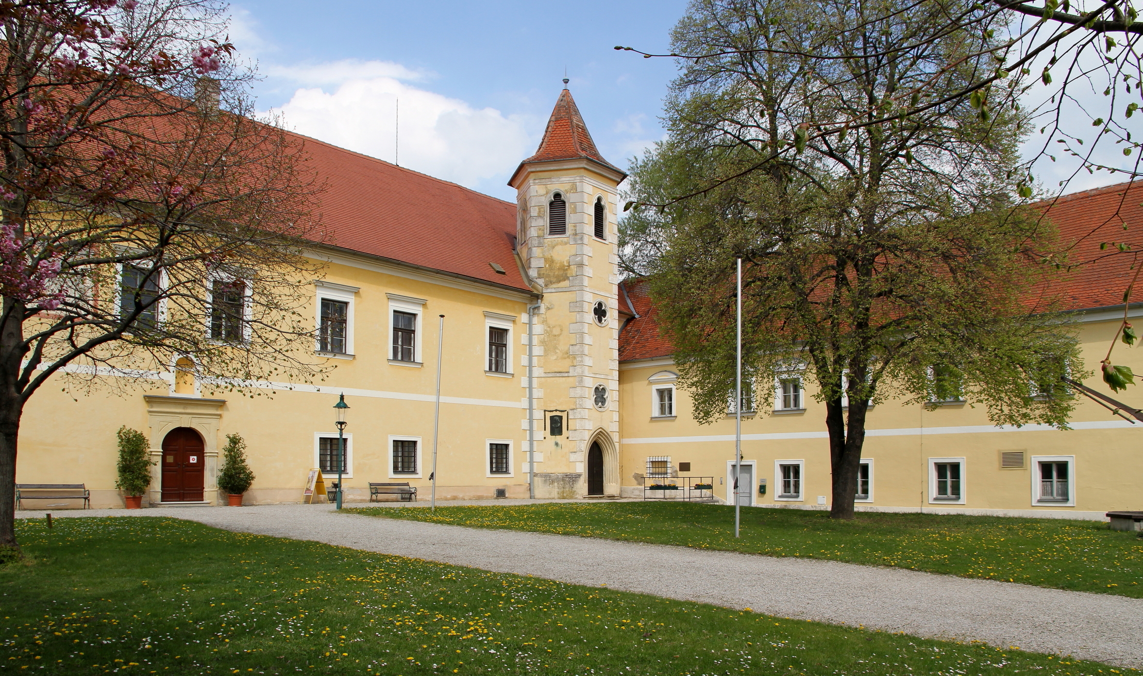 Schloss Atzenbrugg in der niederösterreichischen Marktgemeinde Atzenbrugg. Im Schloss wohnte und komponierte während einiger sommerlicher Aufenthalte Franz Schubert.